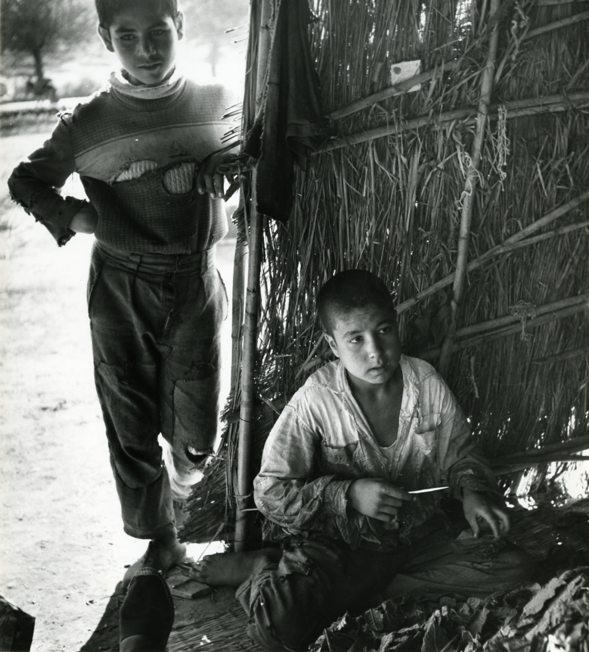 Turchia. Villaggio non identificato. Abitanti nelle capanne. Scene di vita; Servizio fotografico : Türkiye, 1962 / Paolo Monti. - Stampe: 6 : Positivo b/n, gelatina bromuro d'argento/ carta, 24x30. - ((Al verso delle stampe manoscritti i numeri dei fogli di diapositive corrispondenti?: 0144, 0145, 0146, 0148, 0149, 0150. - Sul coperchio della scatola iscrizione didascalica manoscritta a pennarello nero: "Turchia". - Fonte: Rubrica di Paolo Monti: Diapositive 24x36mm (1948-1982), presso Archivio Paolo Monti. Rubrica con elenco soggetti e numeri di inventario (da 1 a 1000) corrispondenti ai fogli a tasche in pvc in cui sono contenute le diapositive